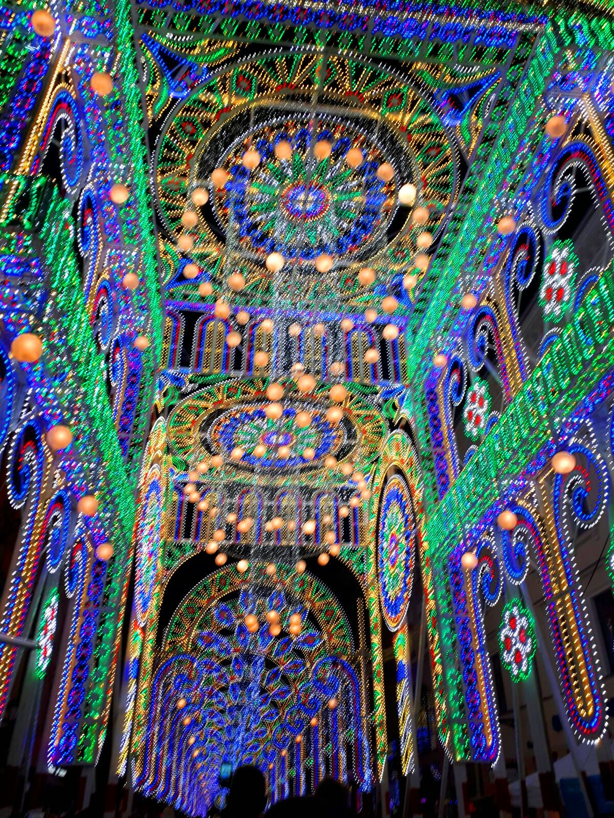 Skyway, Renaissance Palace, Toruń, 2017 rok